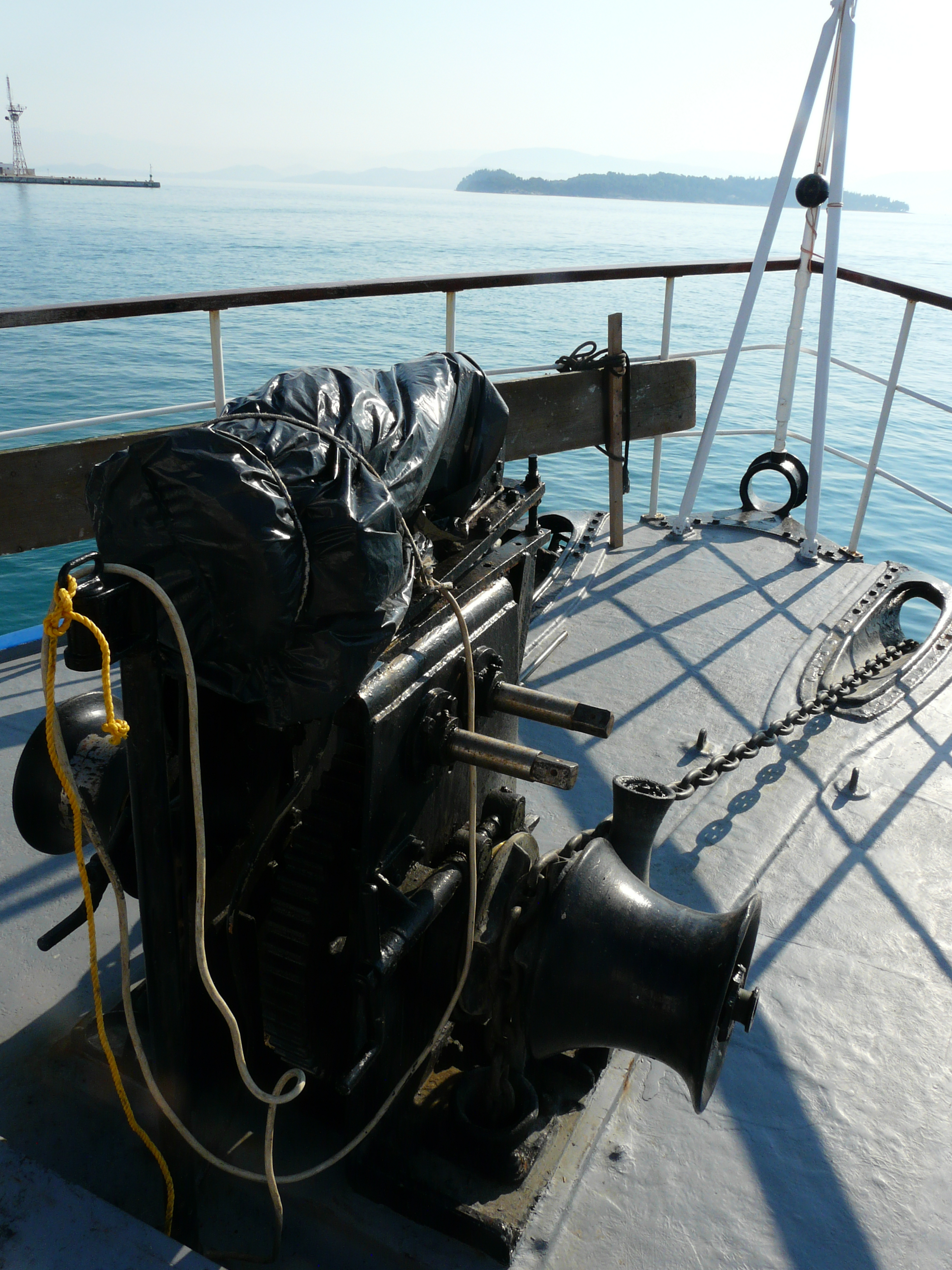 Corfu-Albania trip.